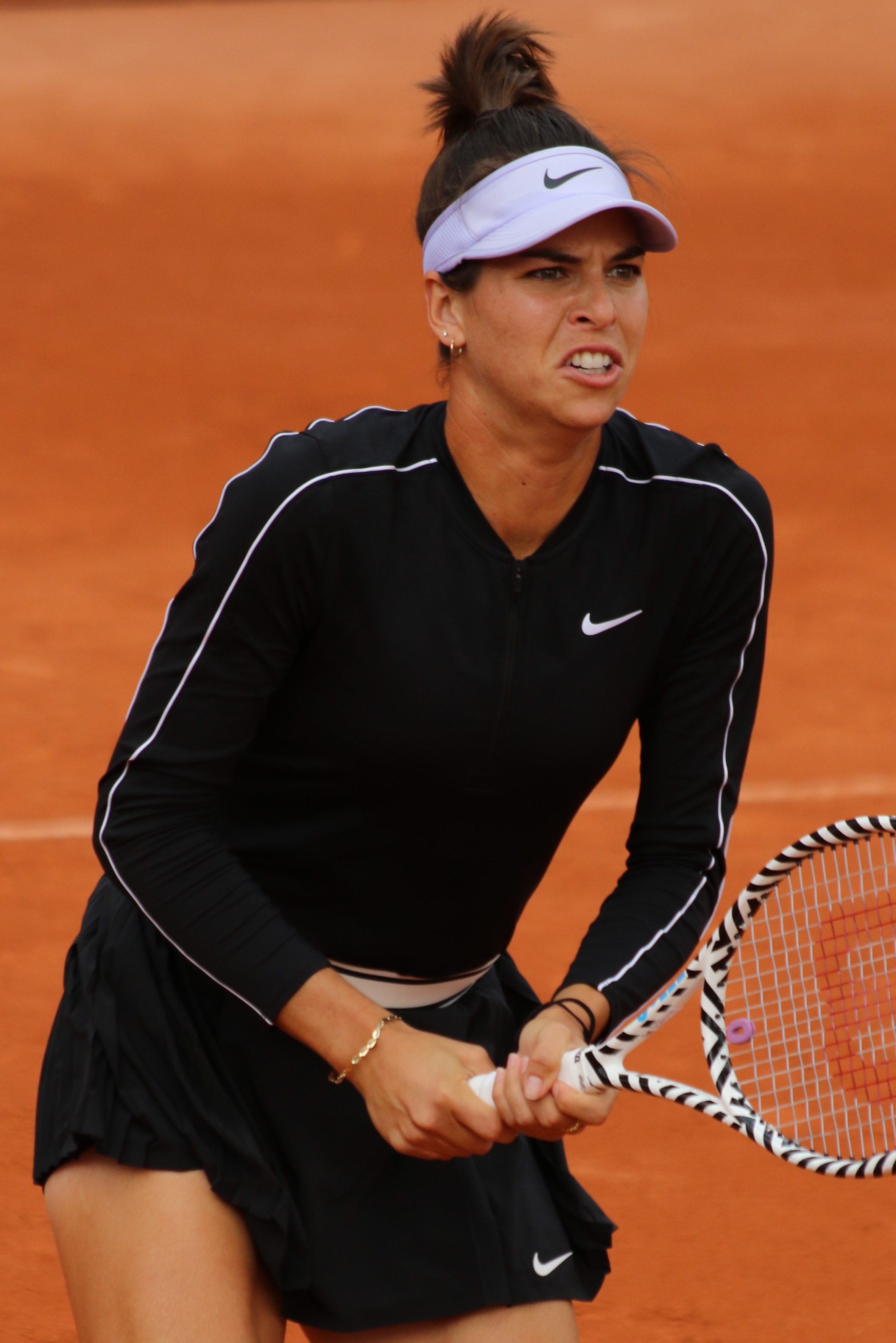 Tomljanovic RG19 (12)